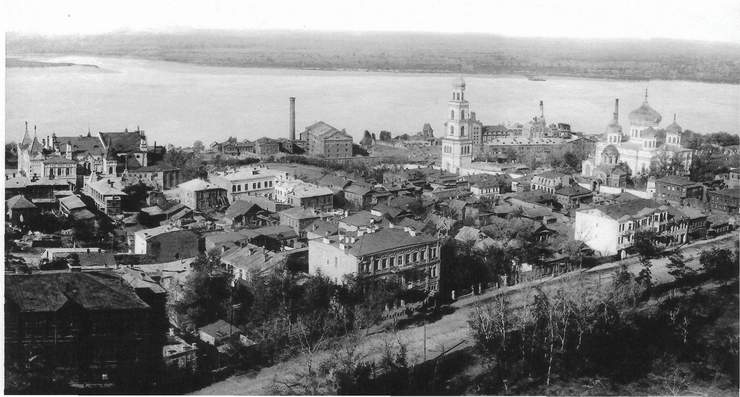 Самара. Вид с Кафедрального собора. Улица Николаевская (ныне Чапаевская). Вид на Иверский женский монастырь